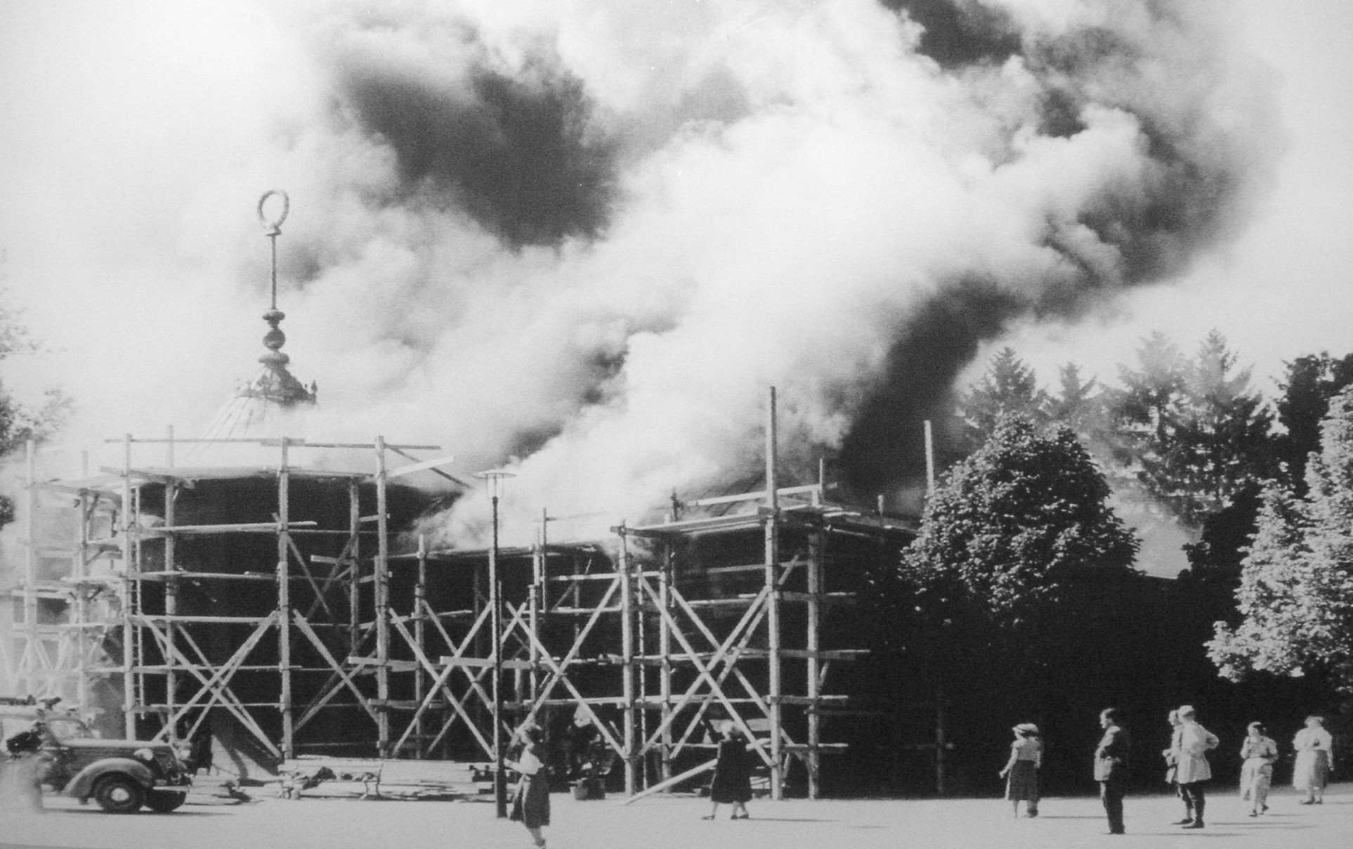 Hagaparken, koppartältet brinner, pressfoto 1953